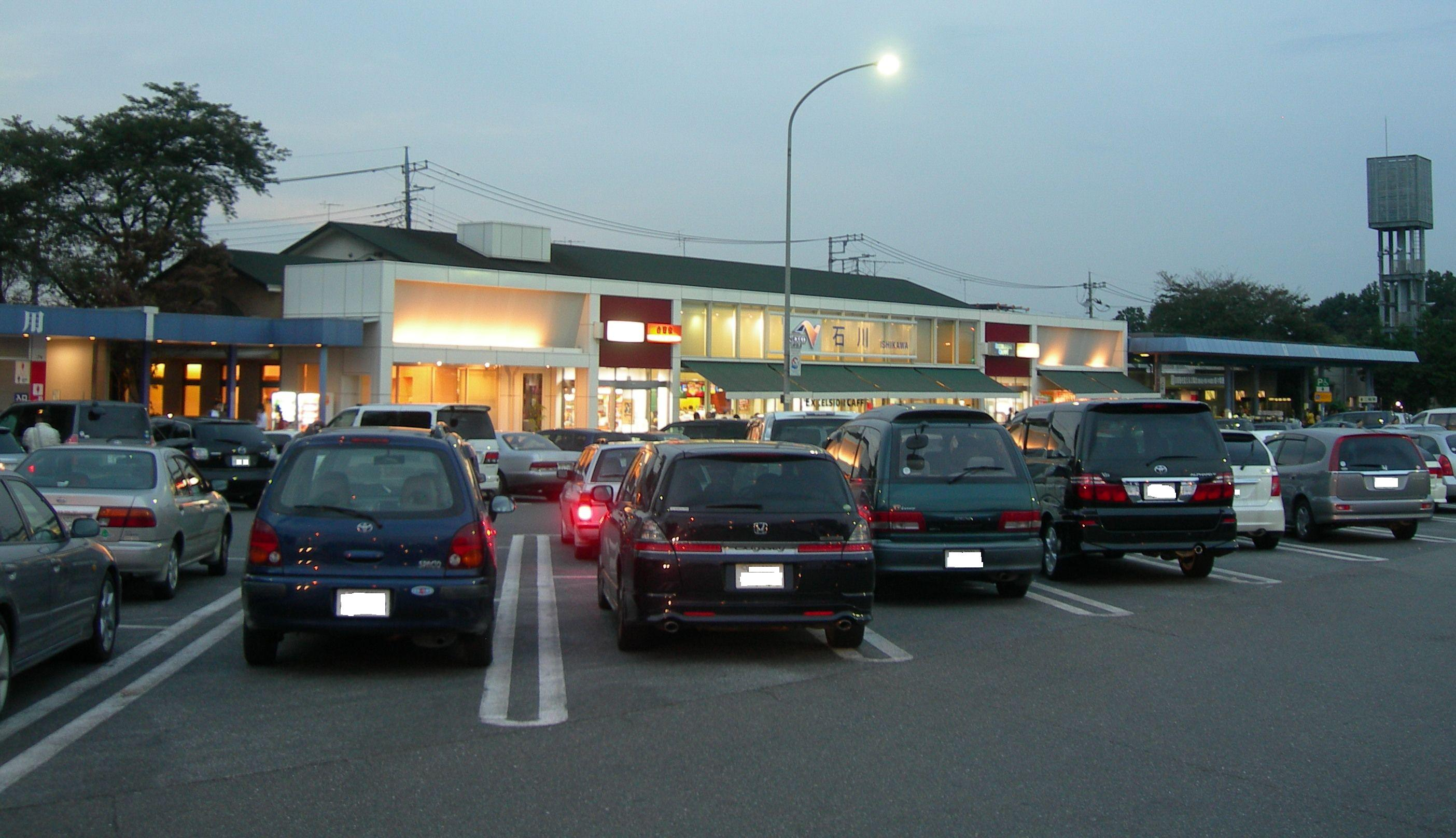 中央自動車道石川PA上り線